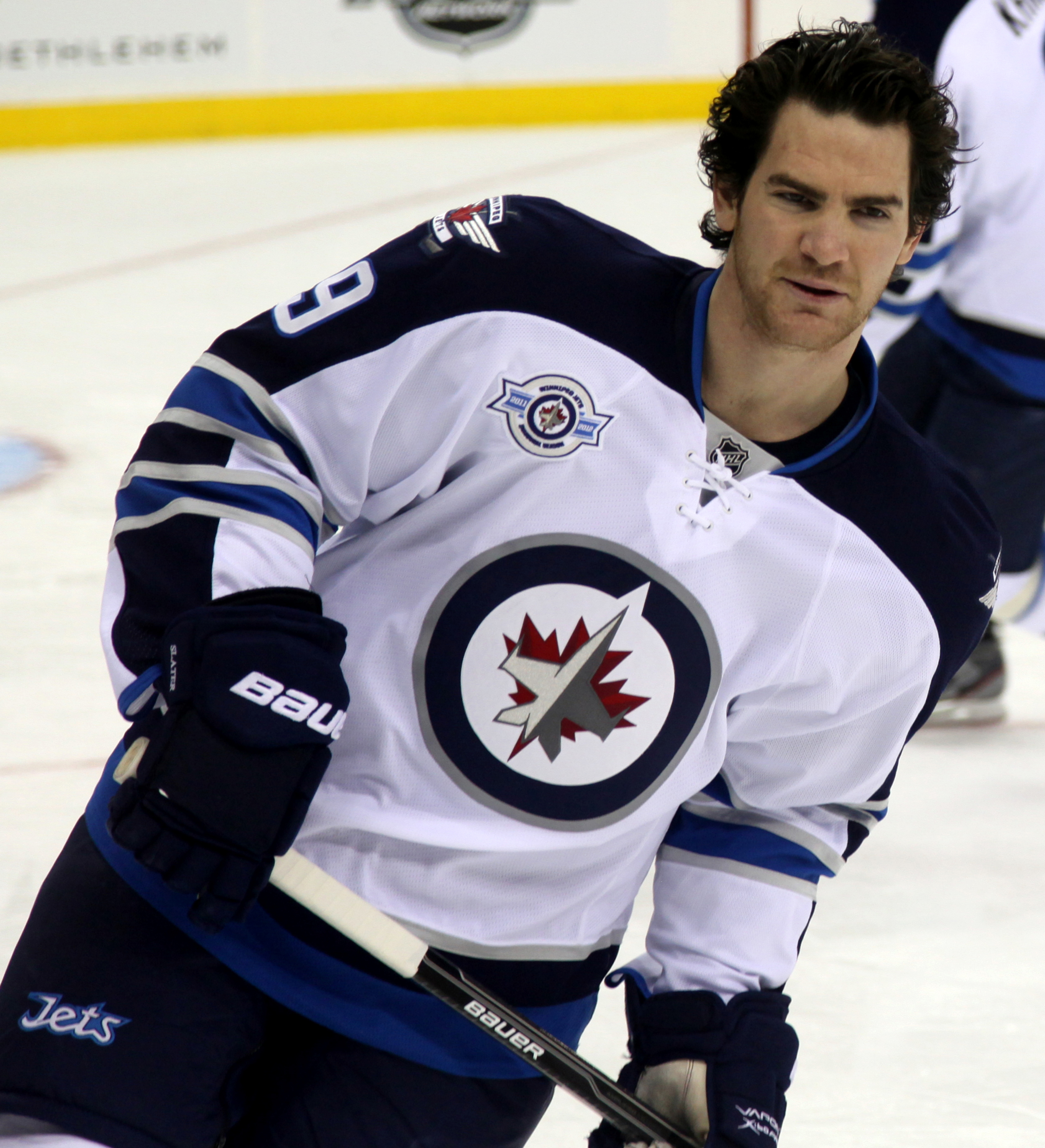 Slater in 2012.